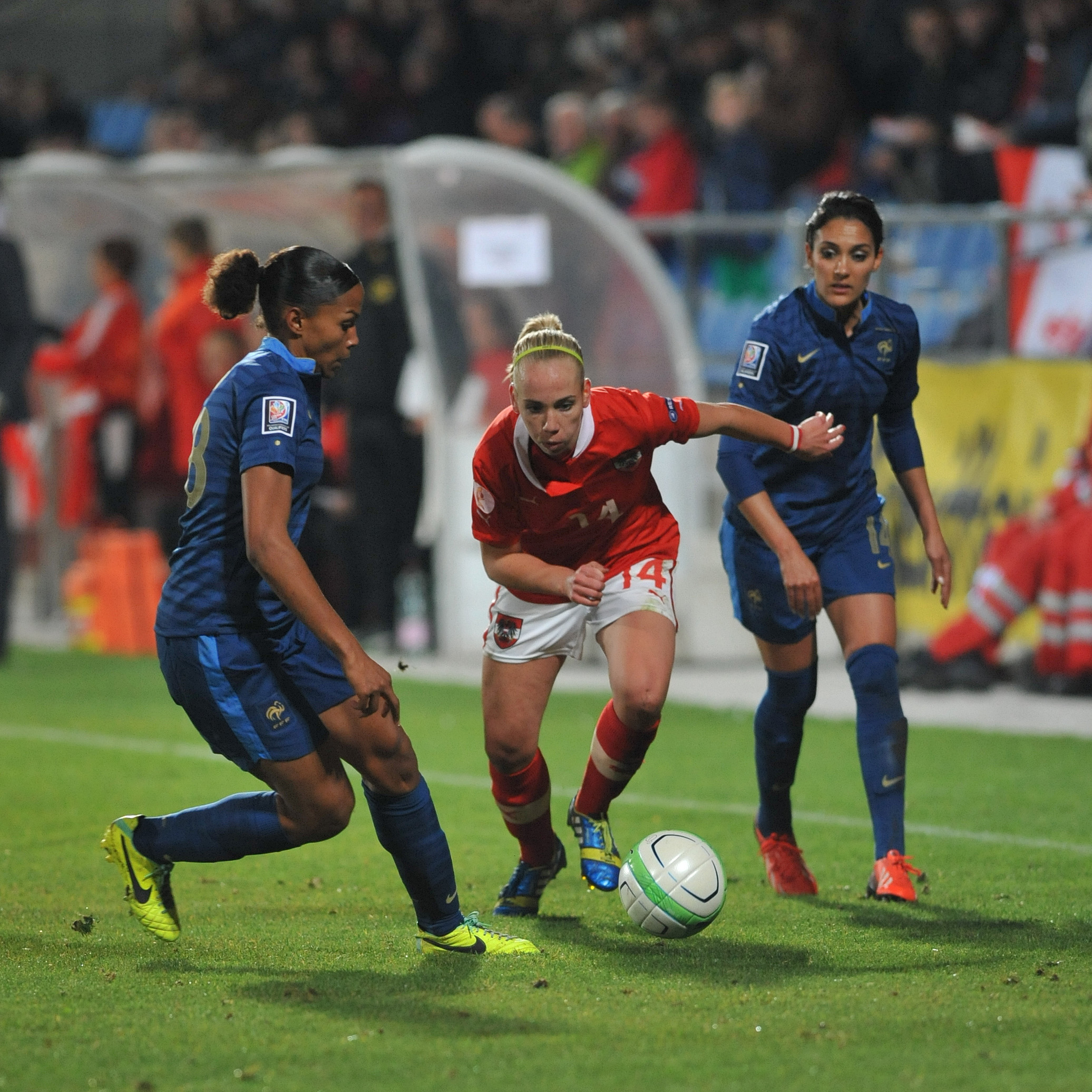 FIFA Women's World Cup 2015 Qualiying Round Österreich - Frankreich am 31. Oktober 2013 in Ritzing: Heike Manhart